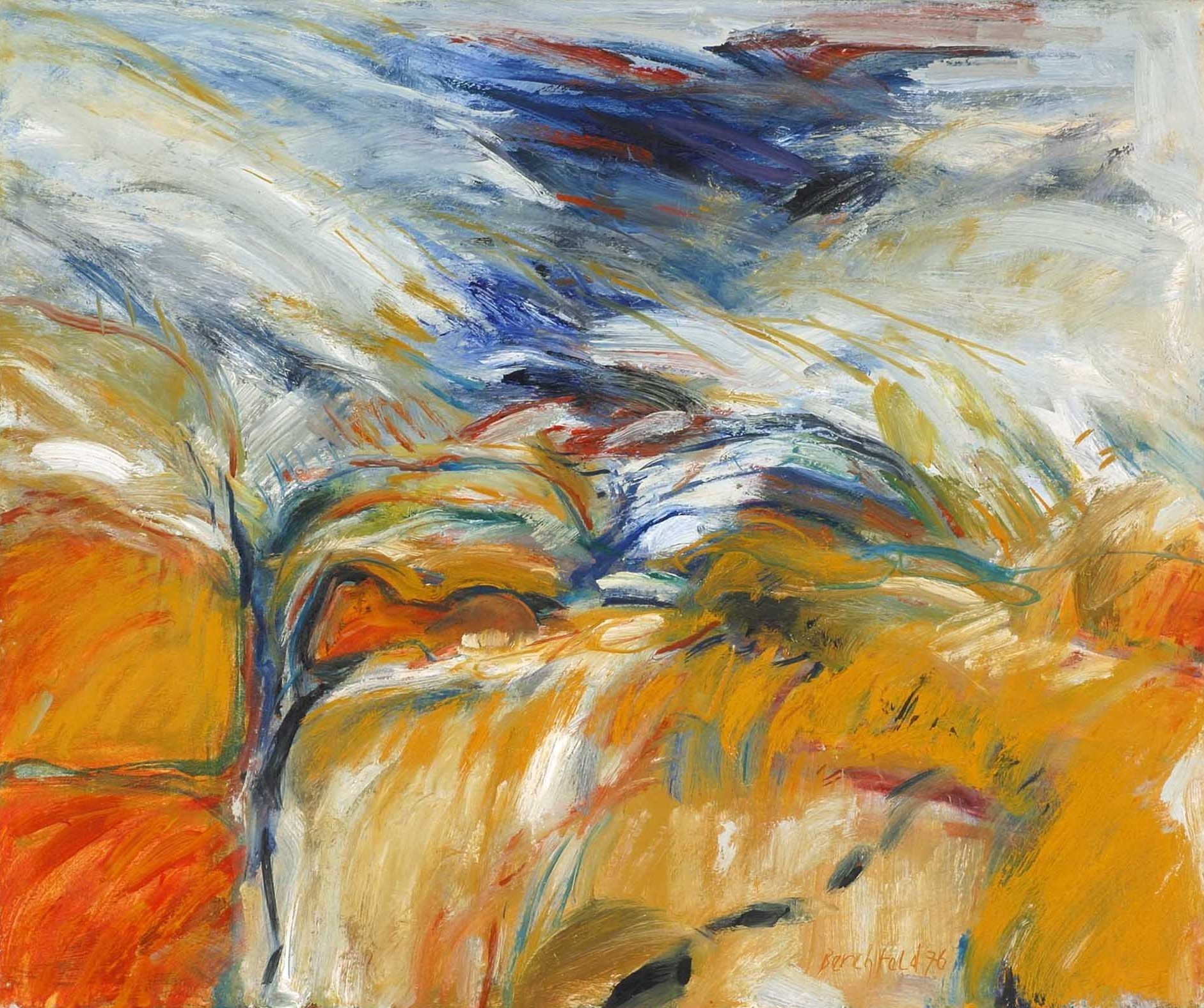 Hügel im Kornfeldtitle QS:P1476,de:"Hügel im Kornfeld" label QS:Lde,"Hügel im Kornfeld"